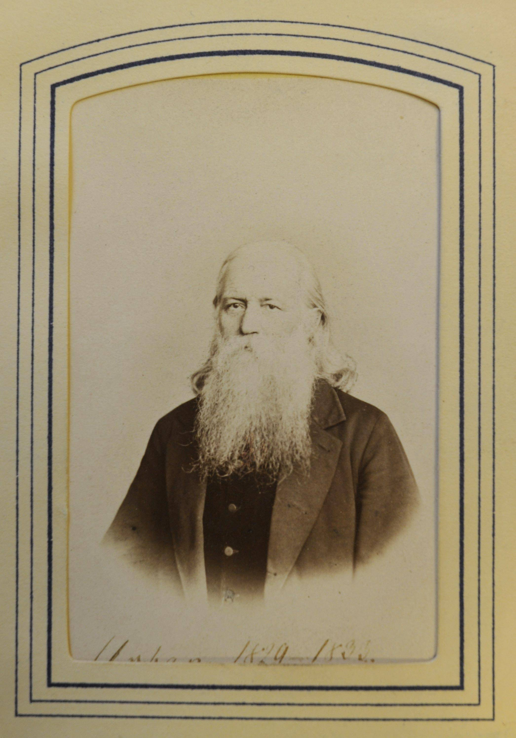 Friedrich-Ludwig Urban Portrait. Hochgeladen von User:Freireligiöse Gemeinde Berlin